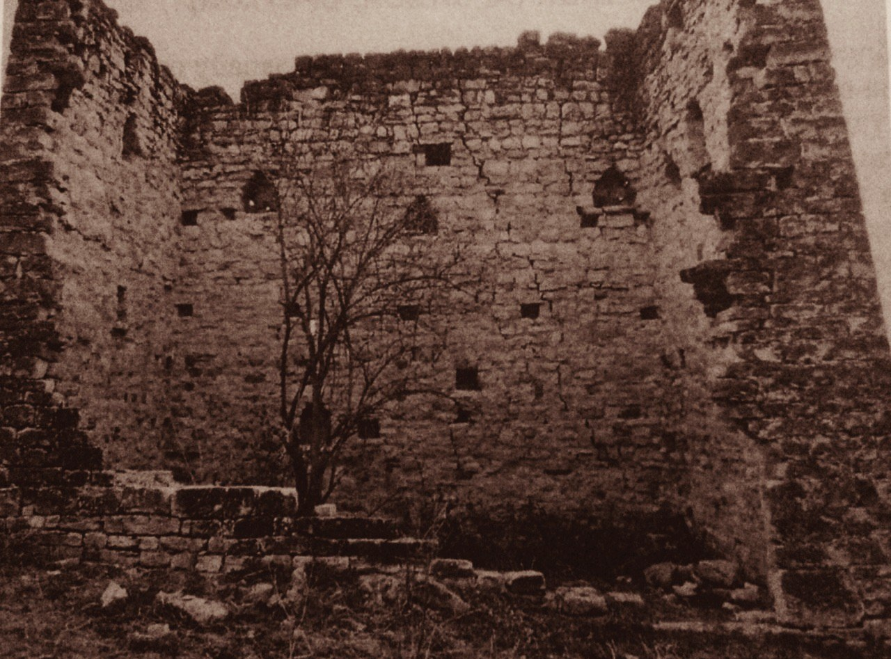 Башня Алхаста Булгучева, расположенная в черте с.Эги-Чож на р.Фортанга